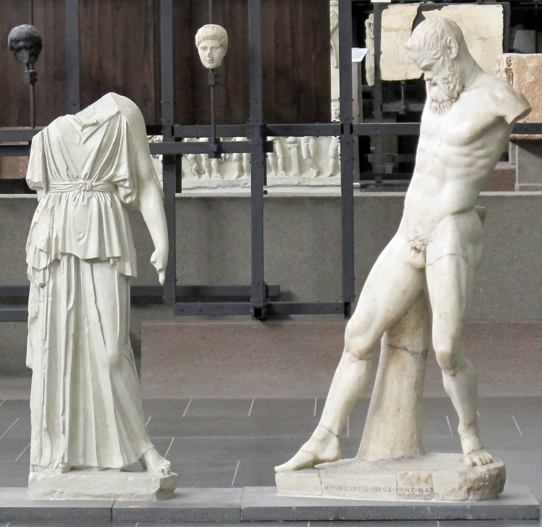 Mirone (da), Atena e Marsia, copia romana da originale del 450 .